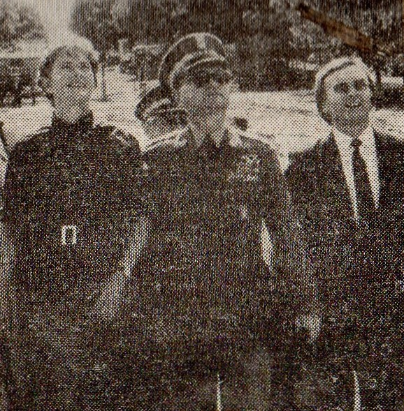 Wojciech Jaruzelski wizytuje budowę pomnika Armii Poznań w Poznaniu - 29.8.1982r. Po lewej rzeźbiarka Anna Rodzińska, po prawej - wojewoda Marian Król.